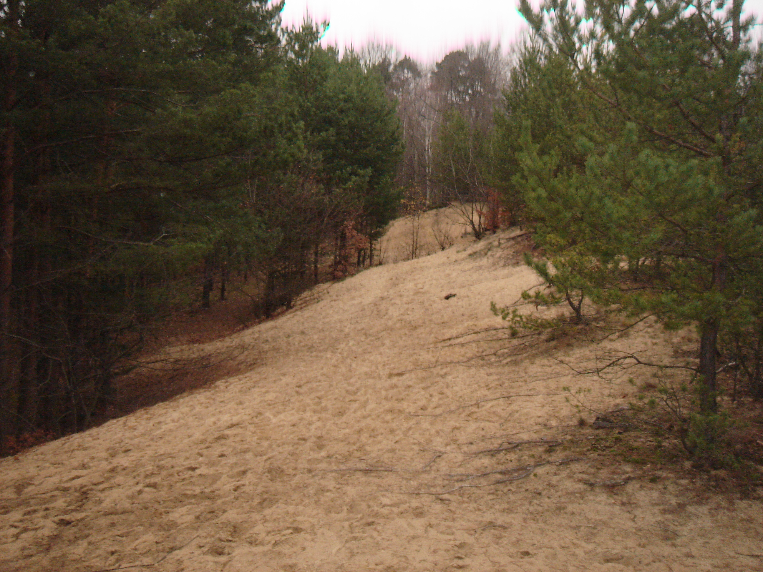 Hang einer Sanddüne in der Dresdner Heide nahe Klotzsche